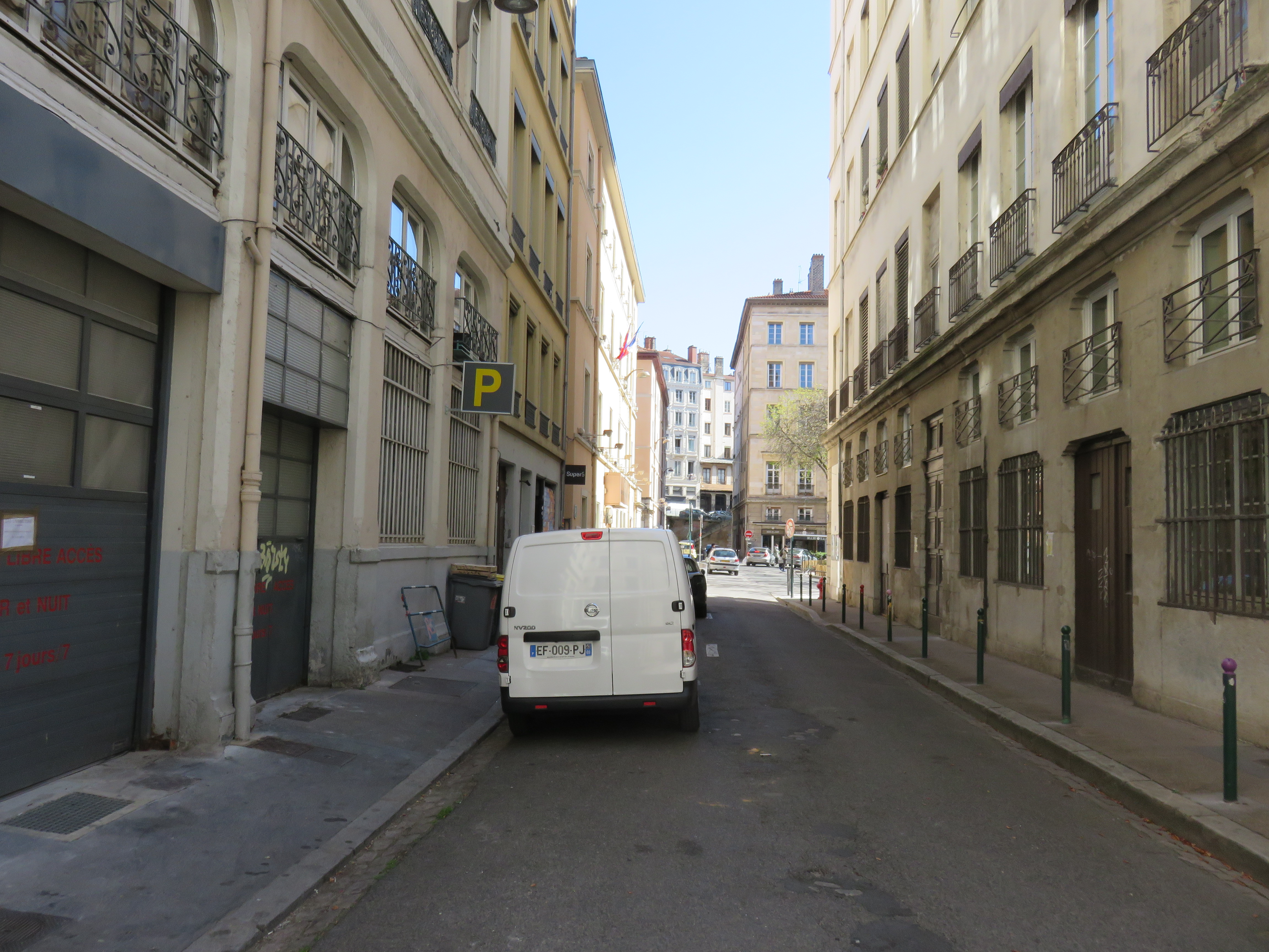 Vue de la rue de Savy en direction de la place Sathonay, dans le 1er arrondissement de Lyon.